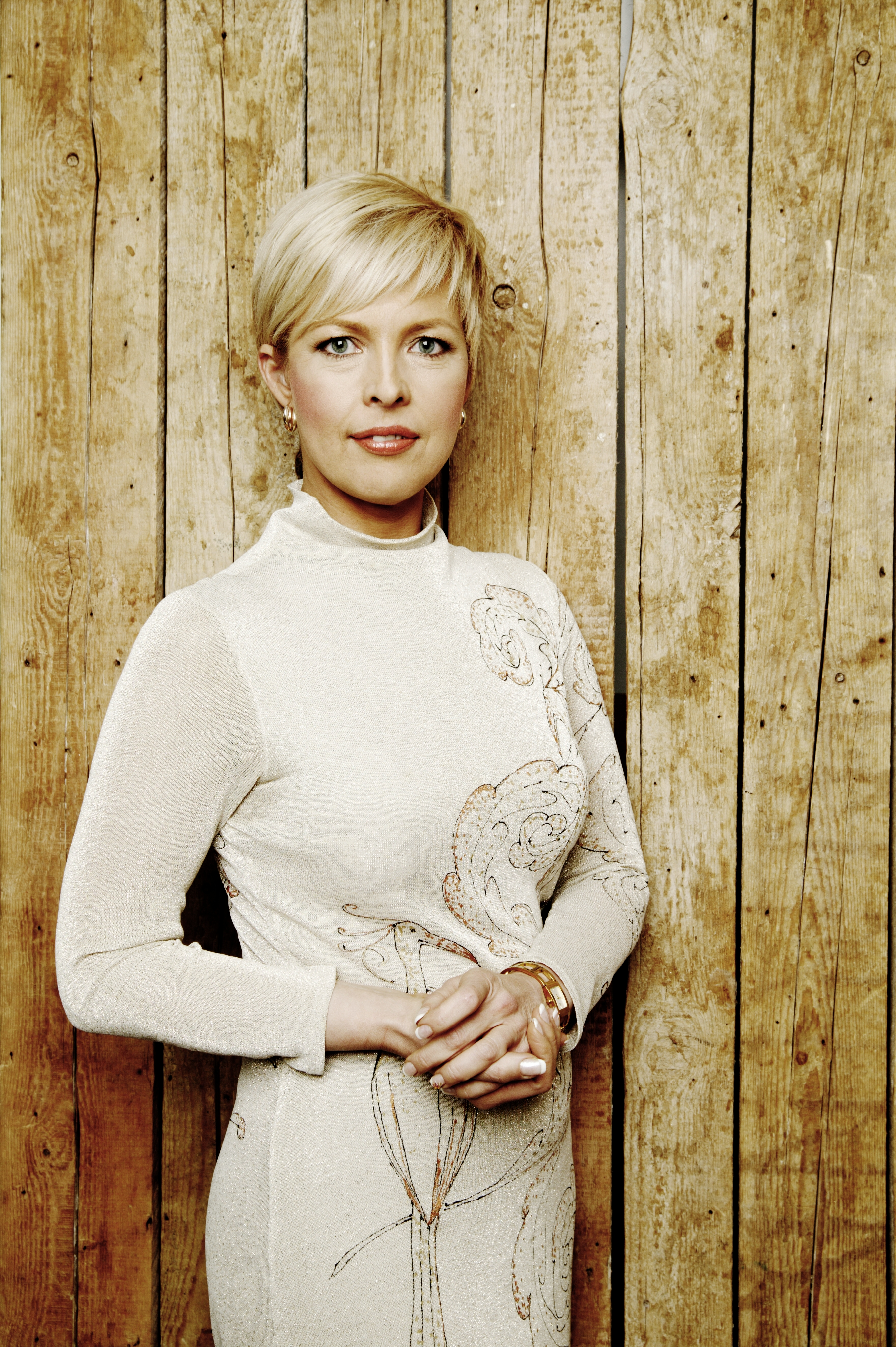 Evelin Ilves